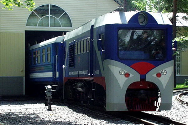 Кратовская ДЖД. Тепловоз ТУ2-078 вытягивает состав из депо.